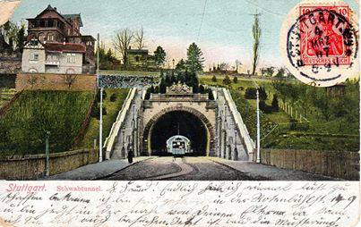 Schwabtunnel in Stuttgart, Postkarte gelaufen 1907